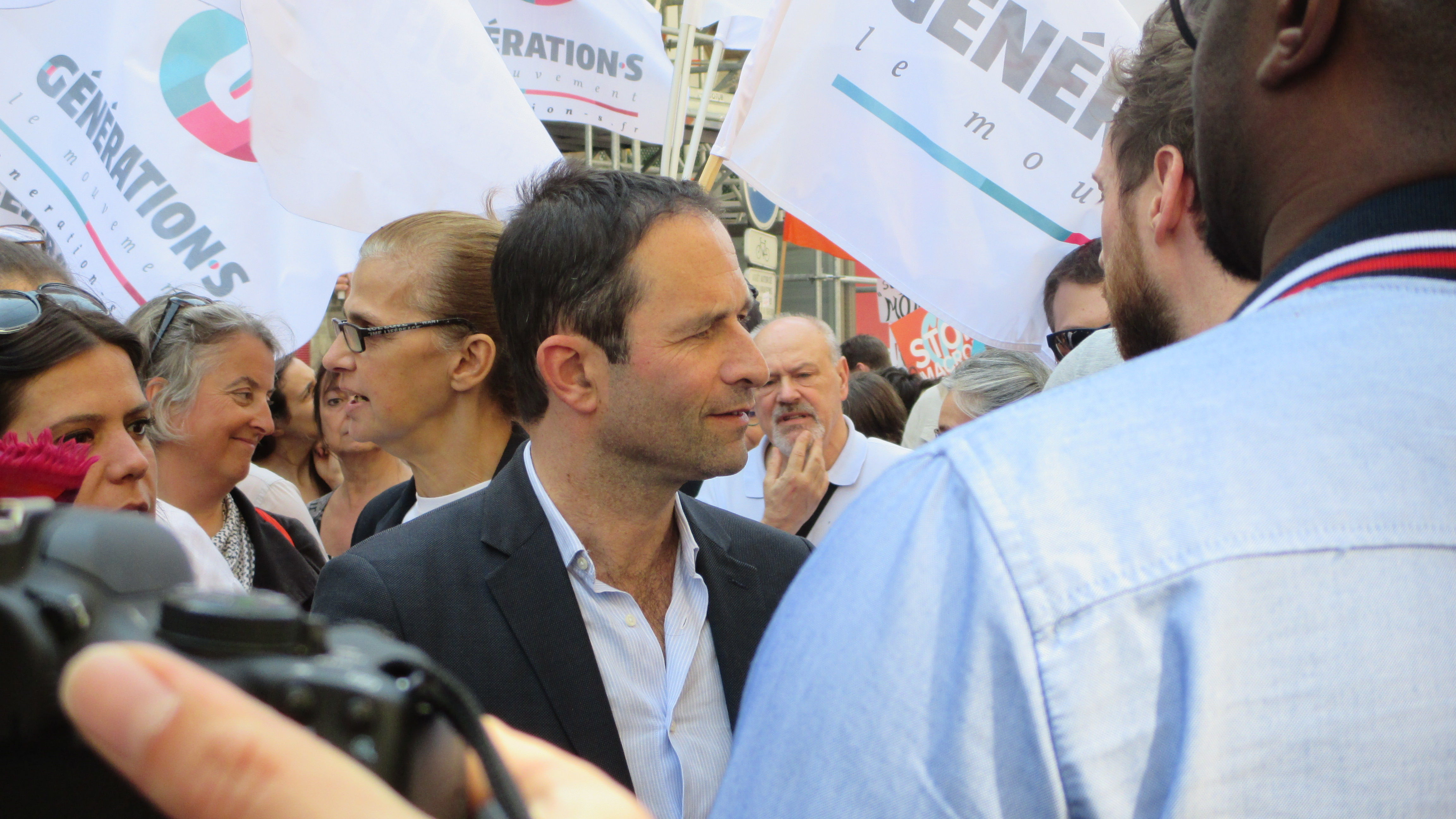 Benoît Hamon avec des militants et militantes de Génération.s, le mouvement à la manifestation du 5 mai 2018 La fête à Macron, entre la place de l'Opéra et celle de la République.